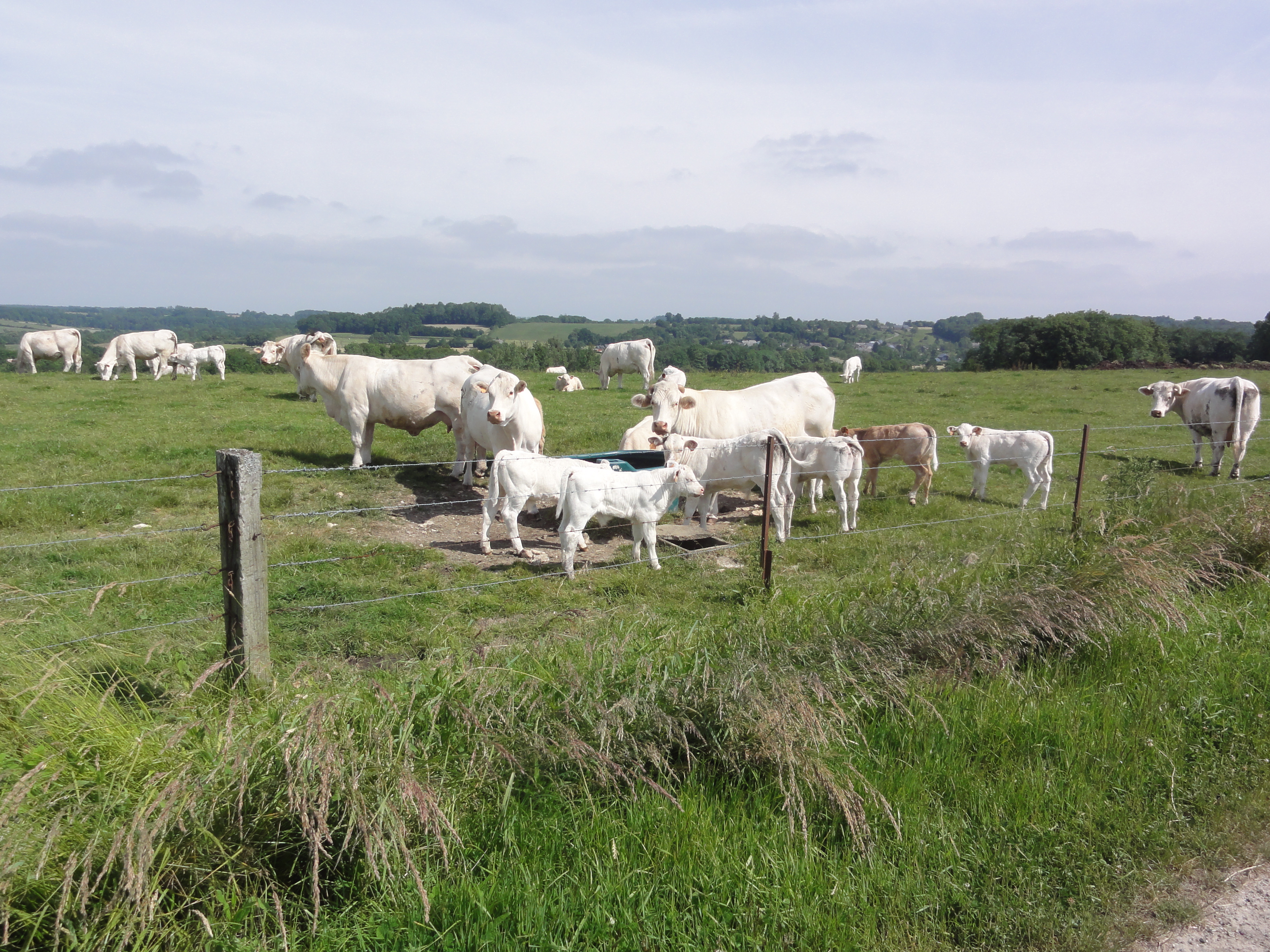 Les Autels (Aisne) paysage avec vue sur le village